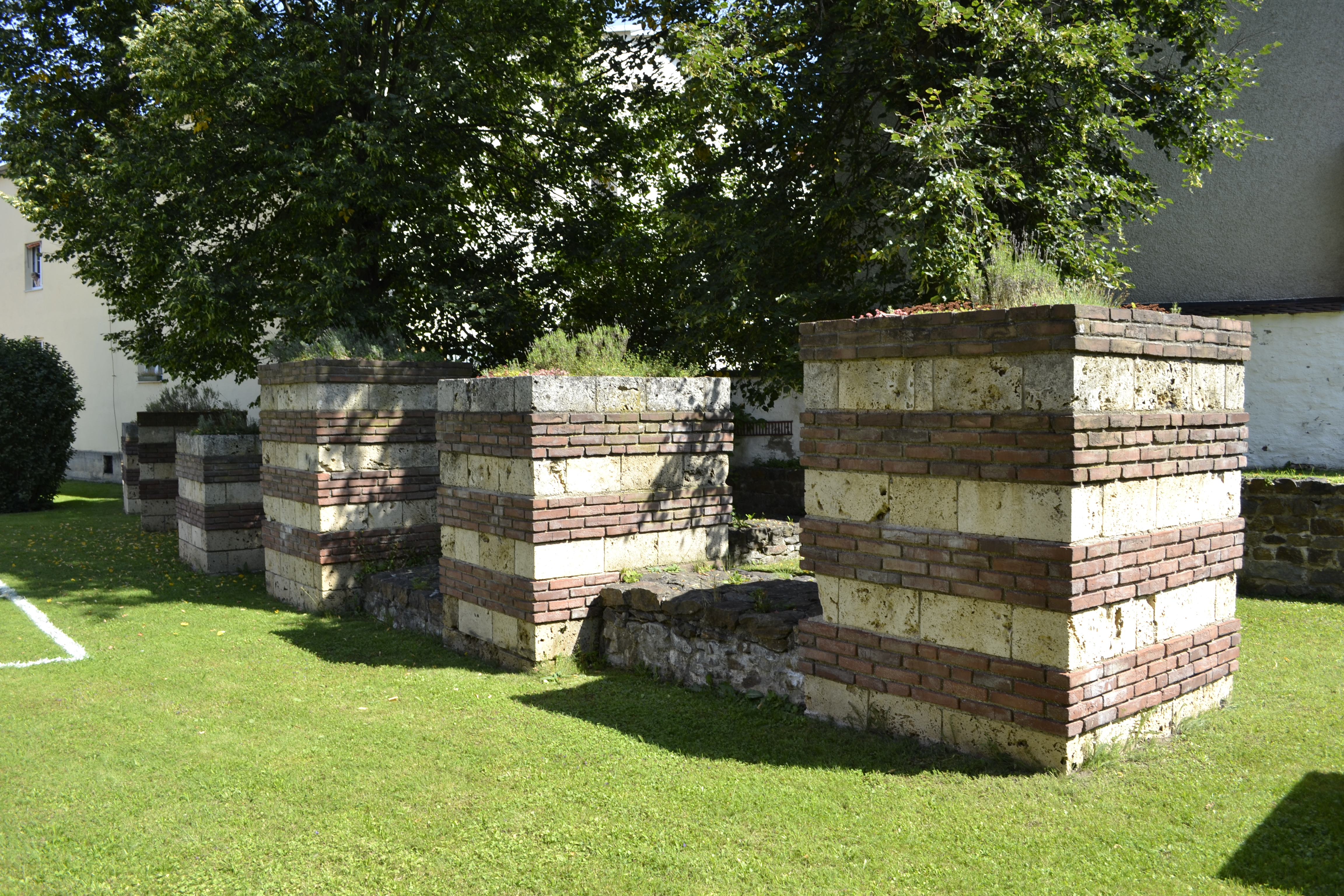 Aufgemauerte Reste der westlichen Arkadenpfeiler und des Horreums des spätantiken norischen Kastells auf dem Gelände des Römermuseums Kastell Boiotro in Passau.